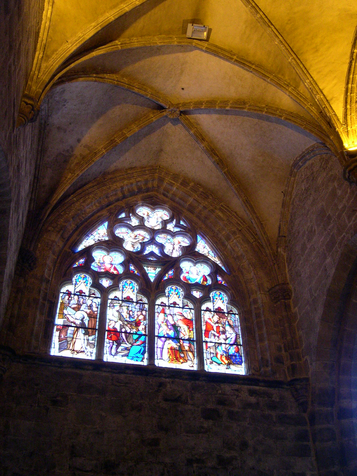 Baie du transept nord de la basilique Notre-Dame de Bon-Secours de Guingamp - Côtes-d'Armor - France .